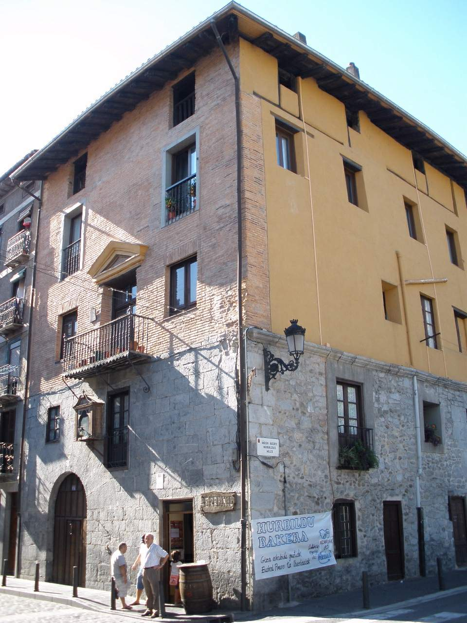 Azkoitia (Gipuzkoa) - Casa-Torre de Balda